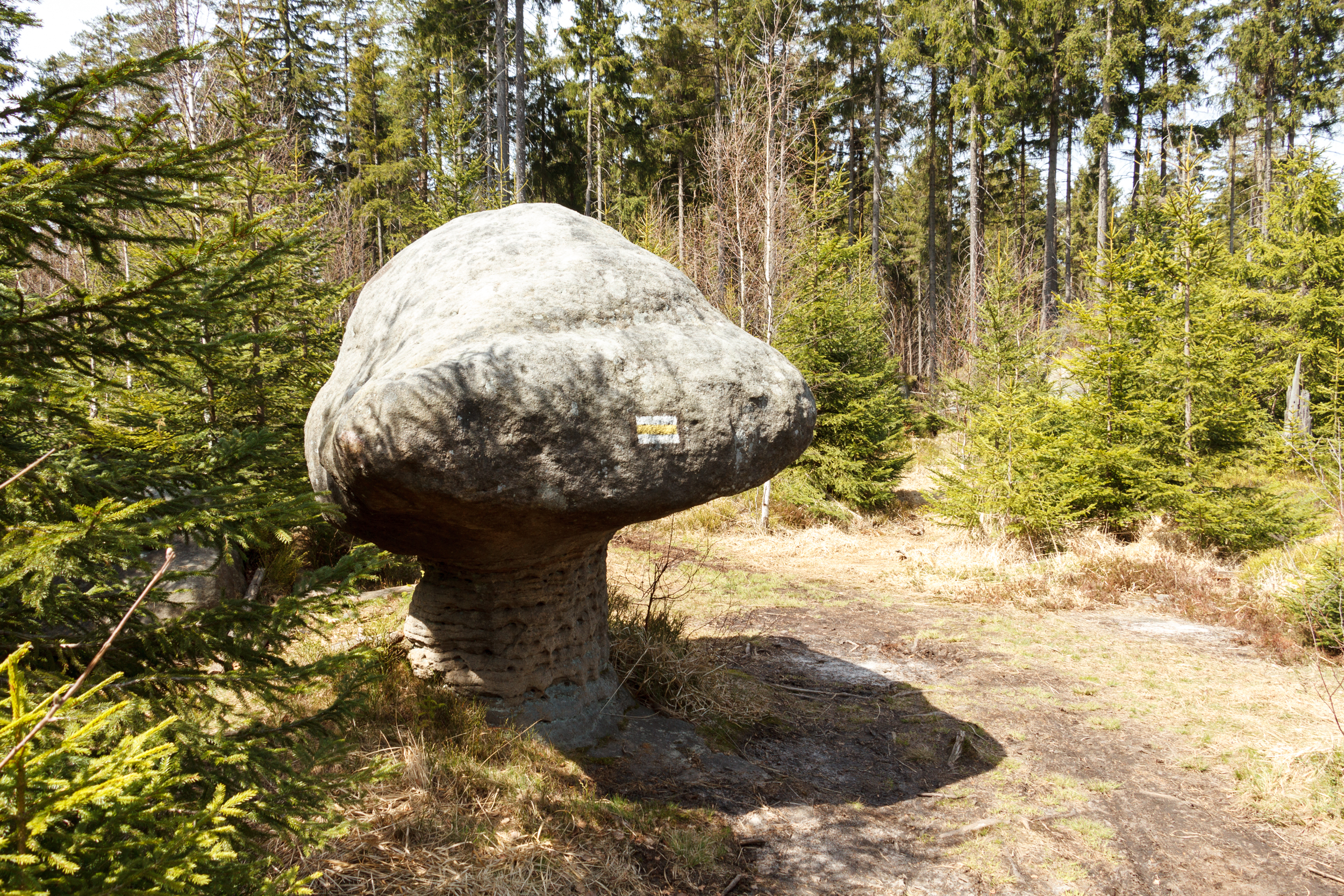 Specjalny obszar ochrony siedlisk Góry Stołowe. This is a photography of Natura 2000 protected area with ID PLH020004